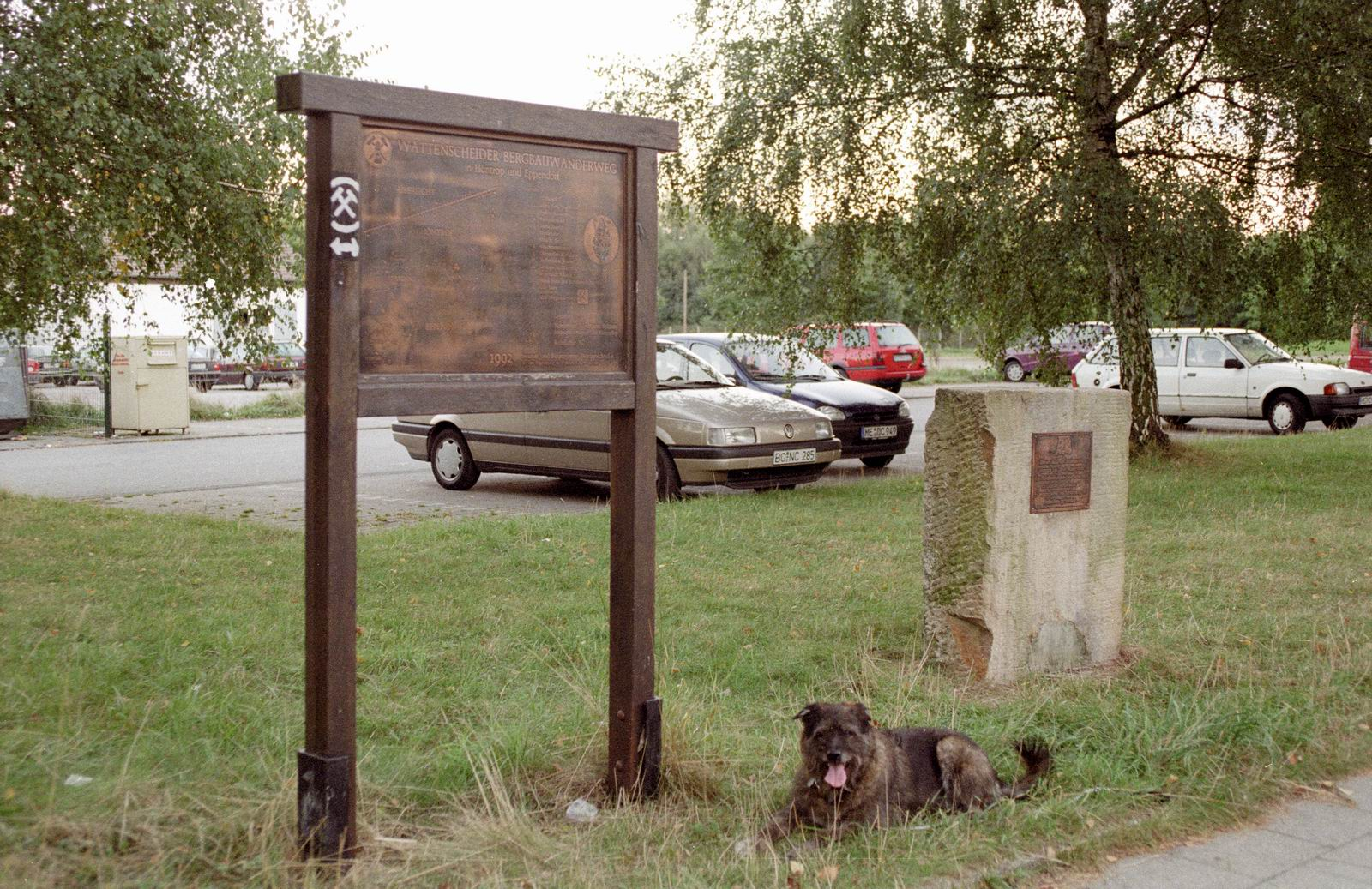 Bergbauwanderweg Wattenscheid, Übersichtstafel Historic walking route of early mining in Bochum Wattenscheid, nearby Eppendorf Date: 1999, Bochum, Germany Author: Maschinenjunge Licence: cc-by-sa-2.5 Bergbauwanderweg Wattenscheid